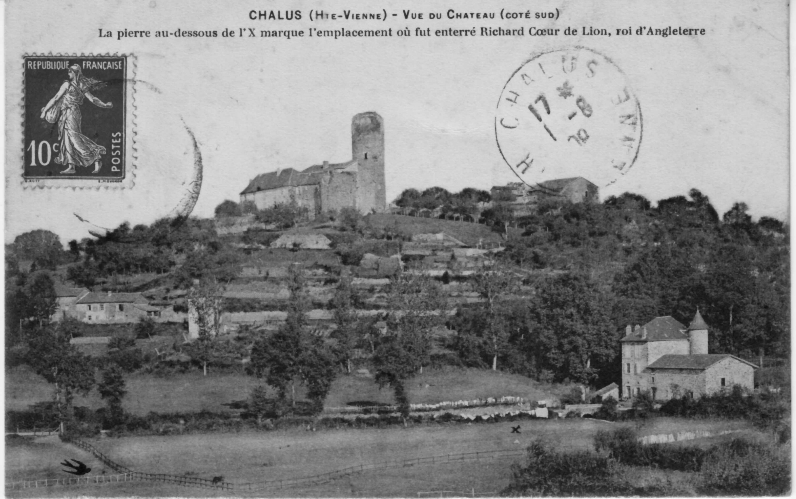 carte postale postée le 1er août 1909 de Châlus représentant Chalus Chabrol dominant la vallée de la Tardoire et indiquant le rocher de Richard, signalé - à l'époque - comme étant le lieu où serait enterré Richard Coeur de Lion !